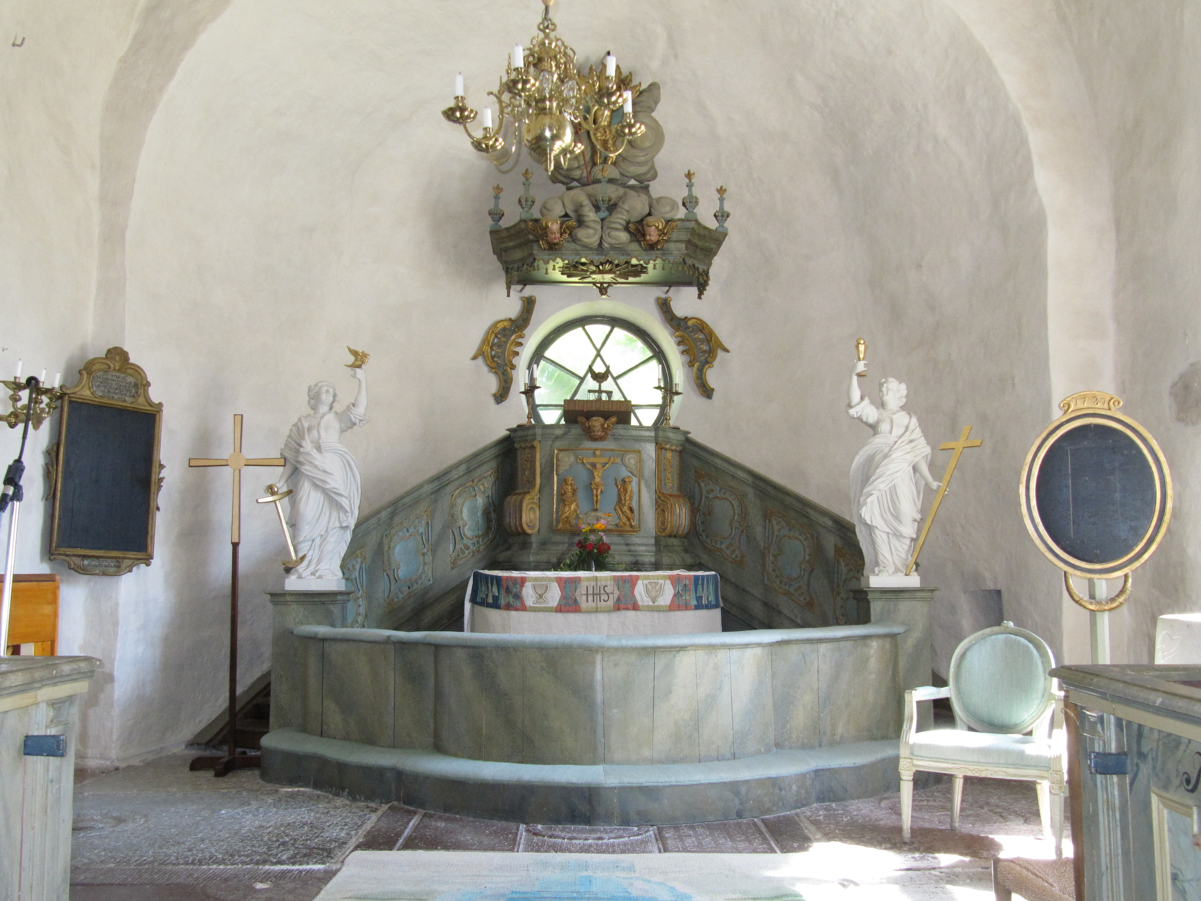 Altarpredikstol i Markims kyrka